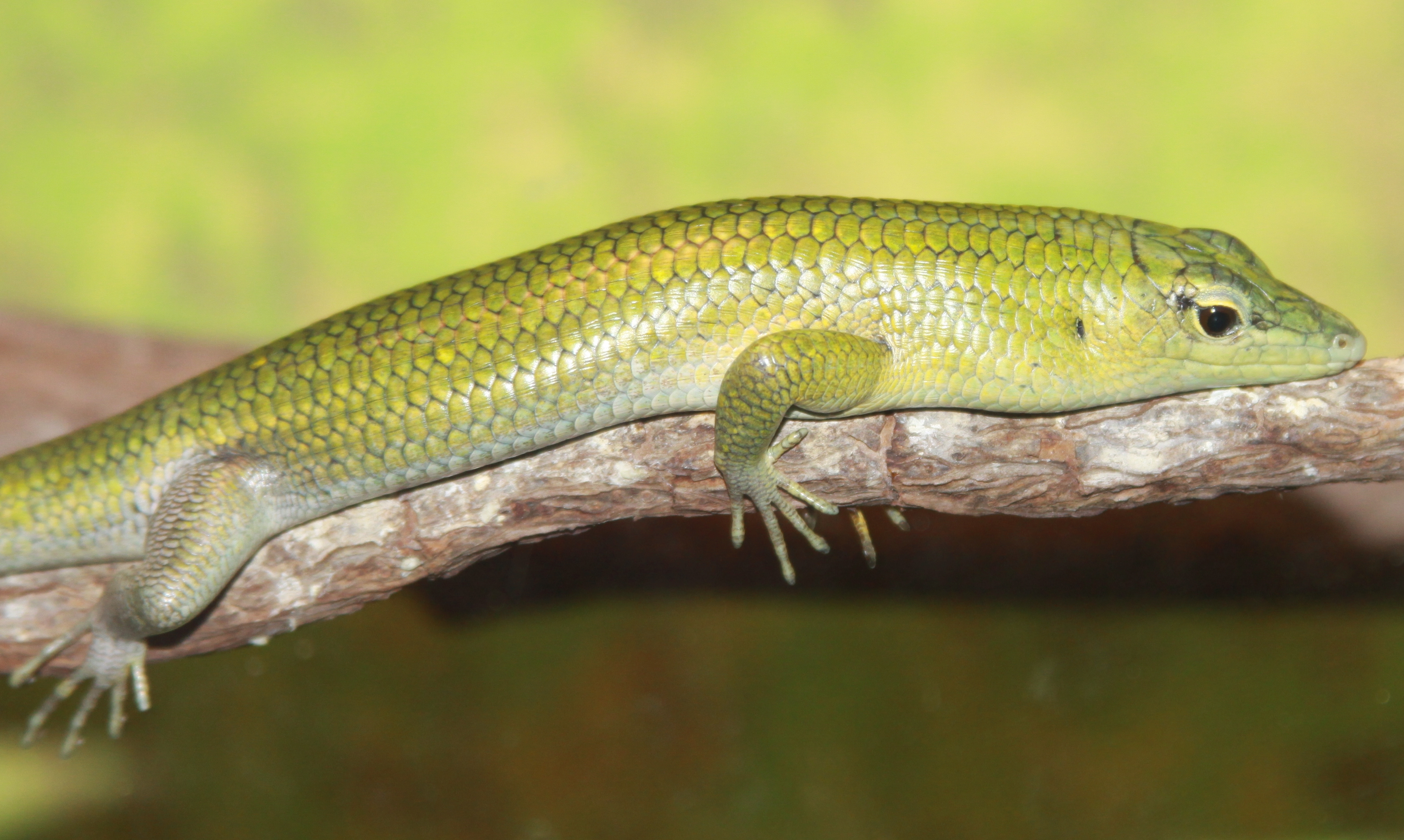 Norfolk Zoo